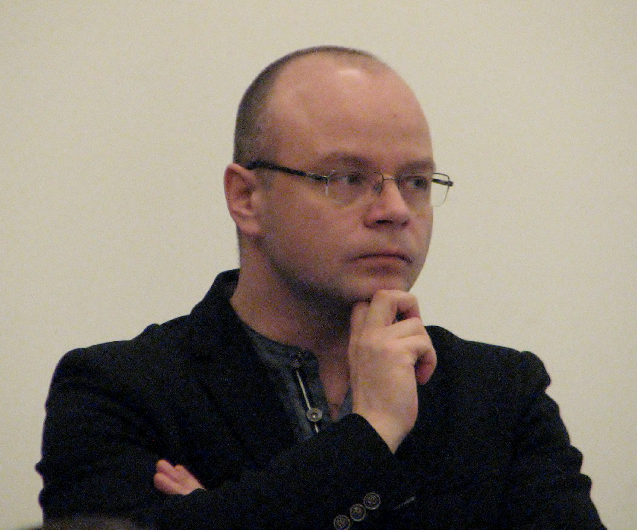 Igor Kopõtin esinemas kaitseliitlastele